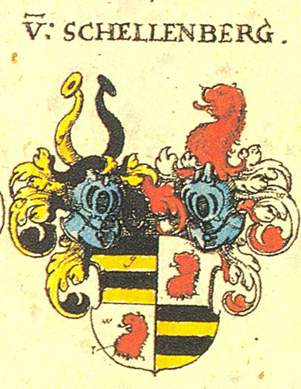 Ritterschaft und Adel in Schwaben von Schellenberg